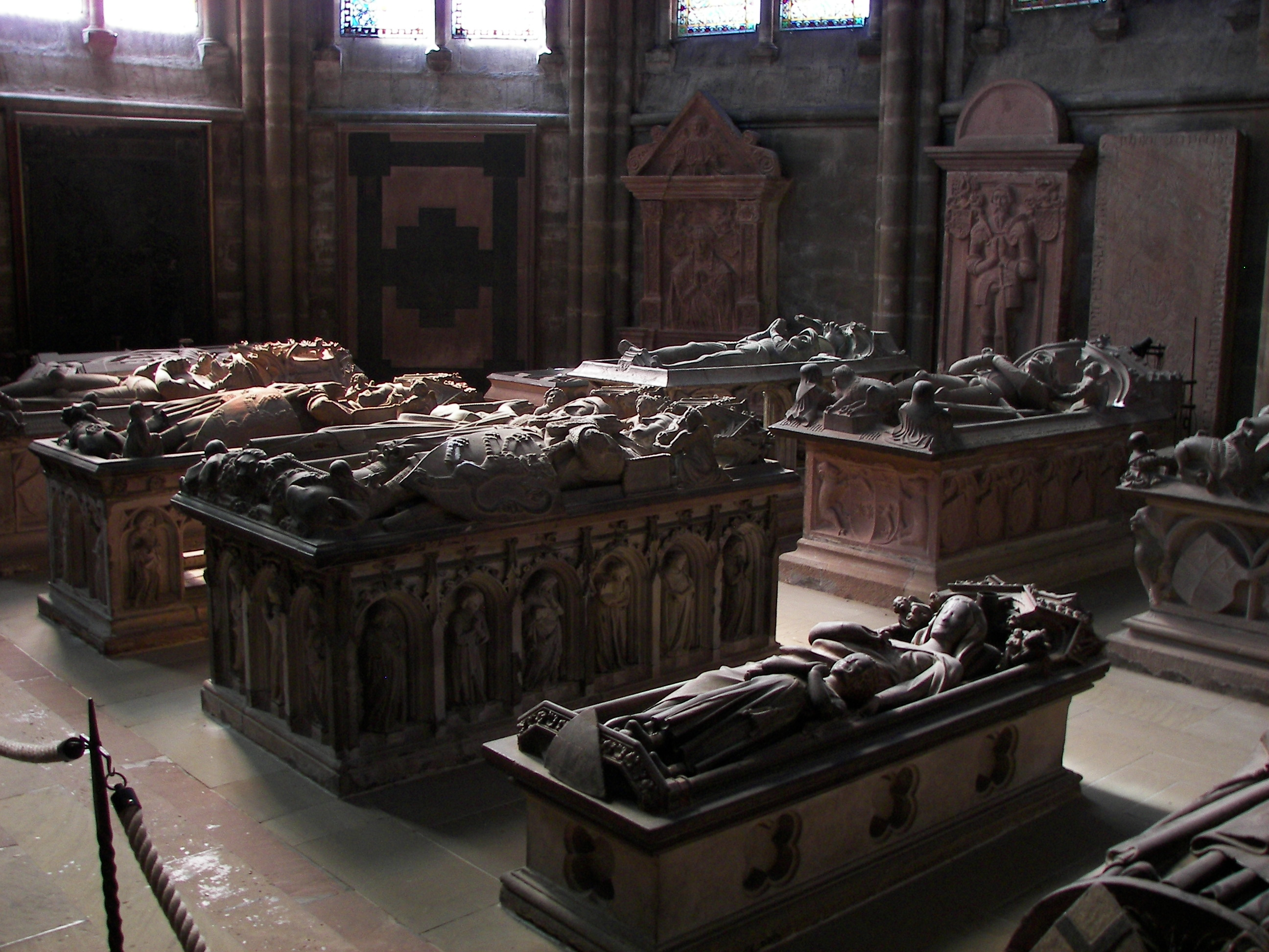 Marburg, Elisabethkirche, eigenes Foto